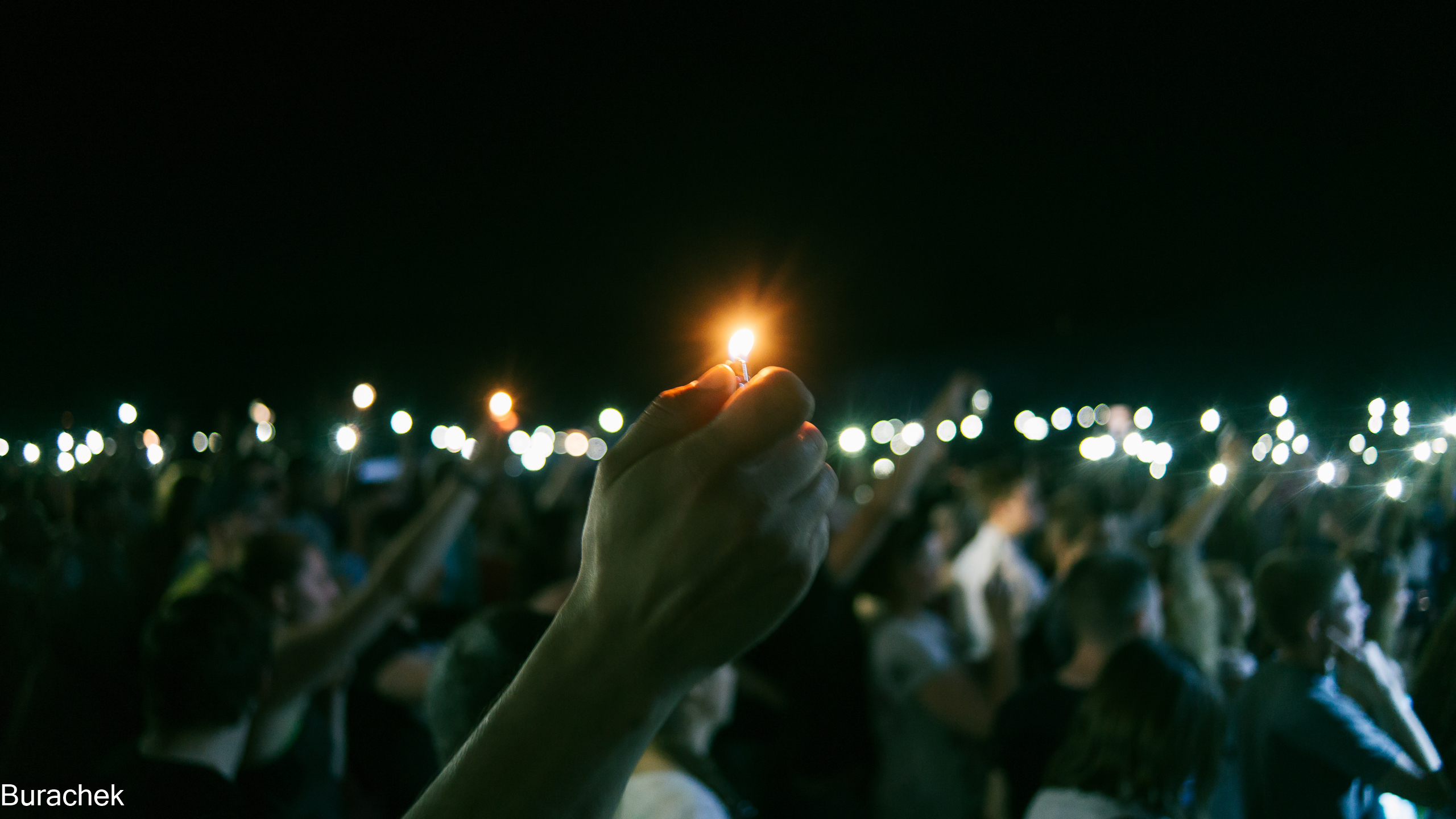 Фінал. Обнова-фест 2017 (автор А. Бурачек)